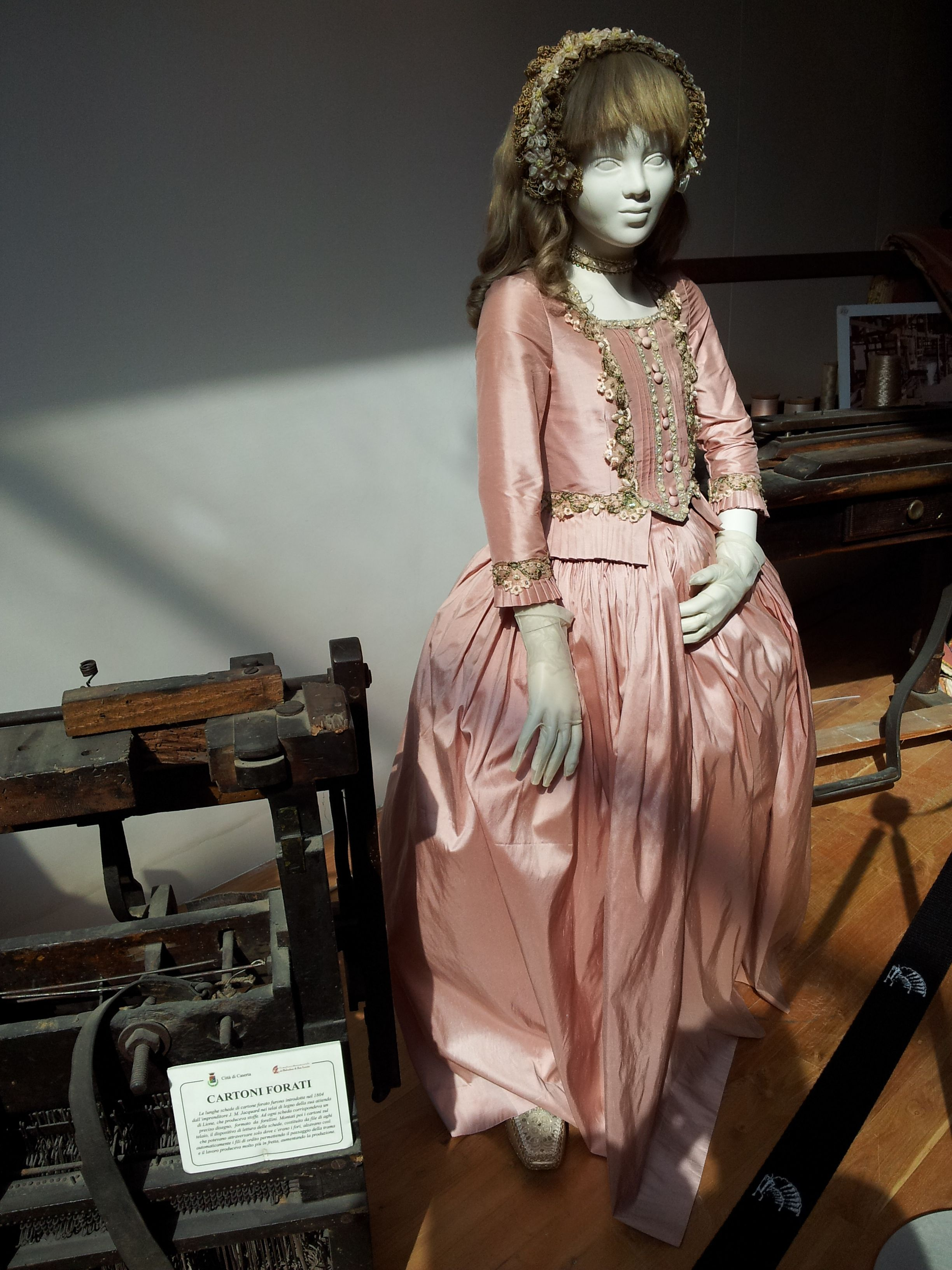 Abito storico proveniente dagli stabilimenti reali di tessitura di San Leucio (Caserta) con accanto il telaio Jacquard